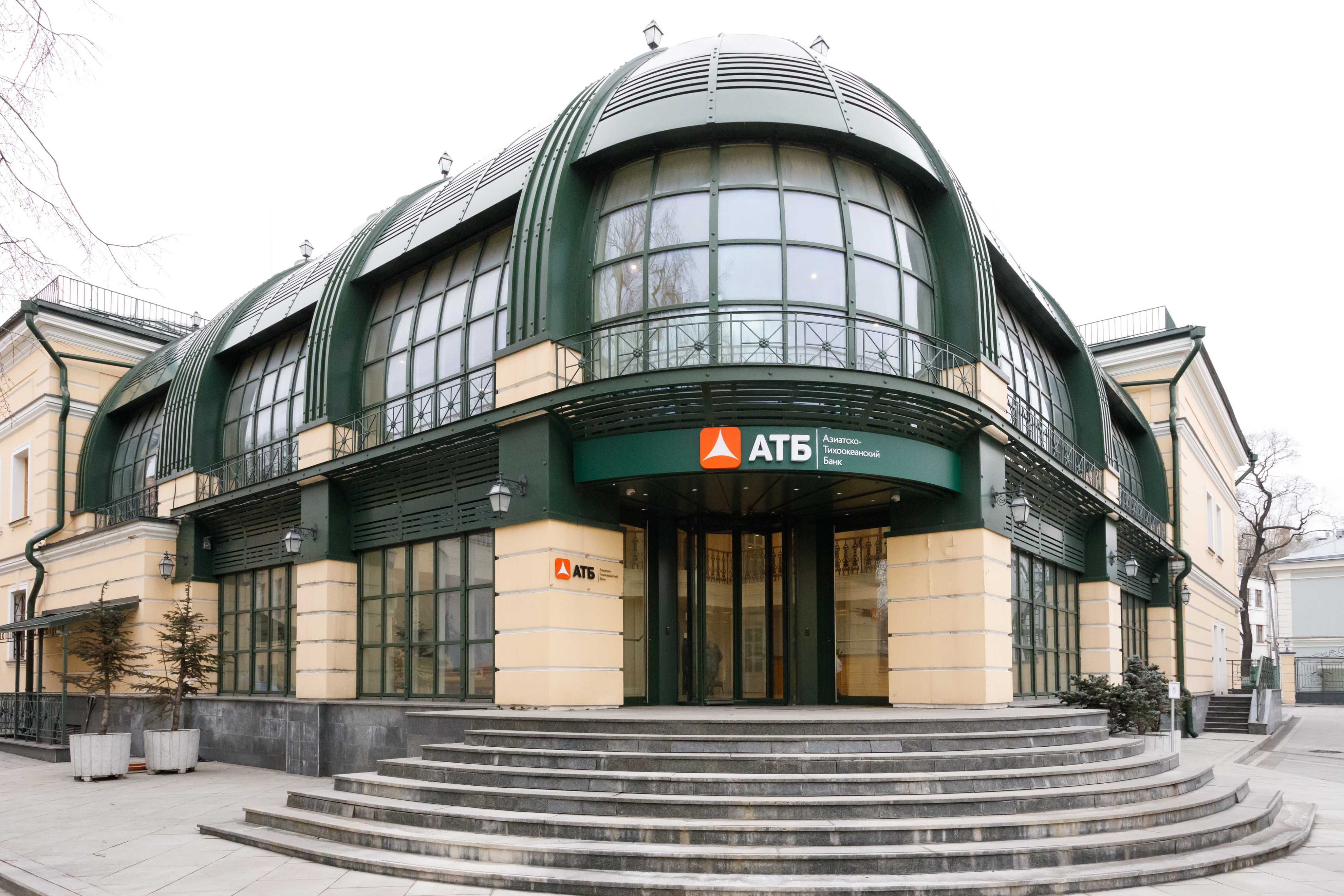 Фото отделения АТБ, г. Москва, пер. Подсосенский